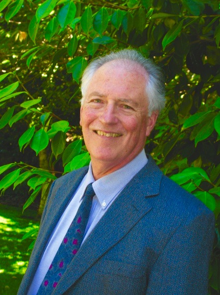 Edmund Burke III